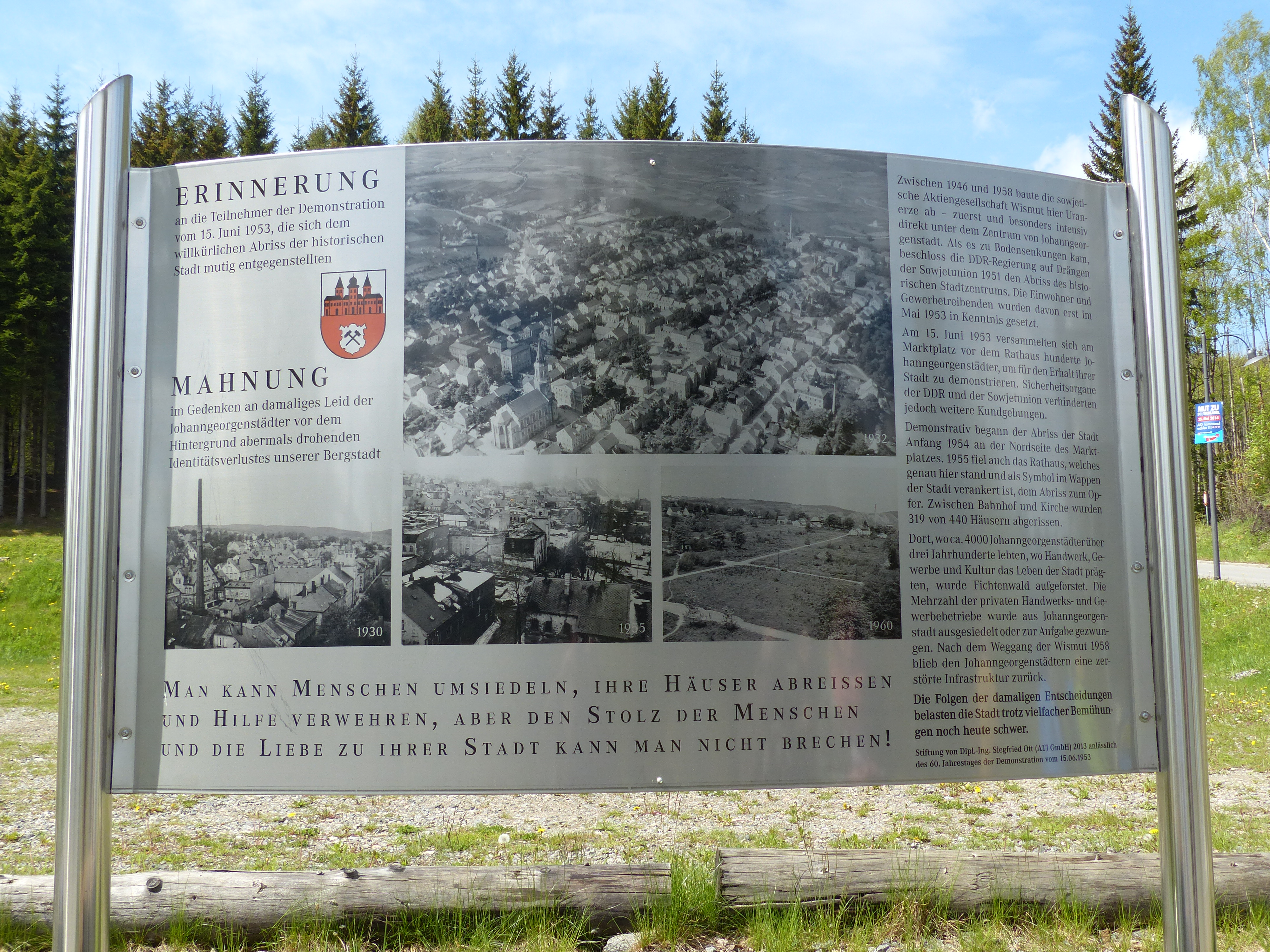 Ansicht von Johanngeorgenstadt